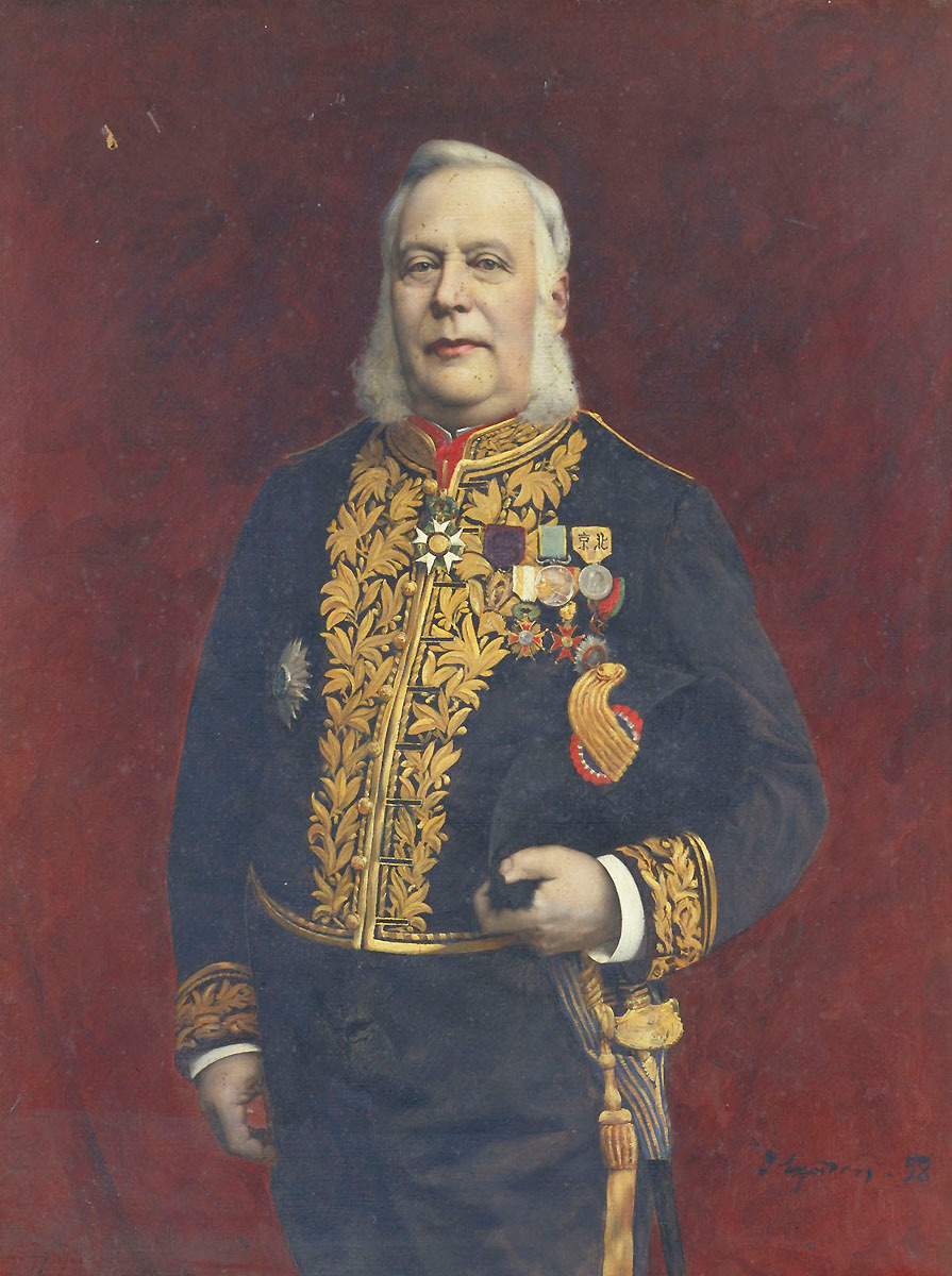 Portrait de l’Amiral Eugène Manen (1828-1897) par Jean Syndon en 1898.